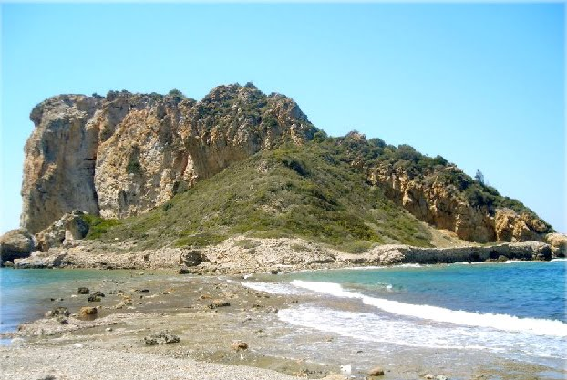 Çıfıtkale (ancient "Myonnesos") in en: Doğanbey, Seferihisar, İzmir, Turkey